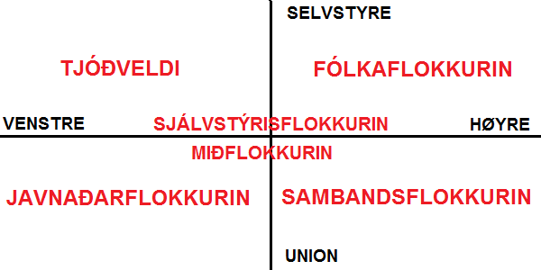 Oversikt over de politiske partienes ståsteder på Færøyene, på aksene selvstyre–union og venstre–høyre.